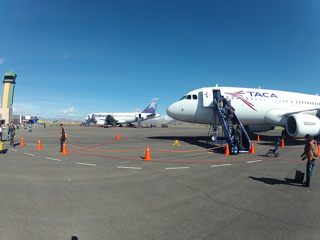 aviones de LAN y TACA en aeropuerto de Juliaca